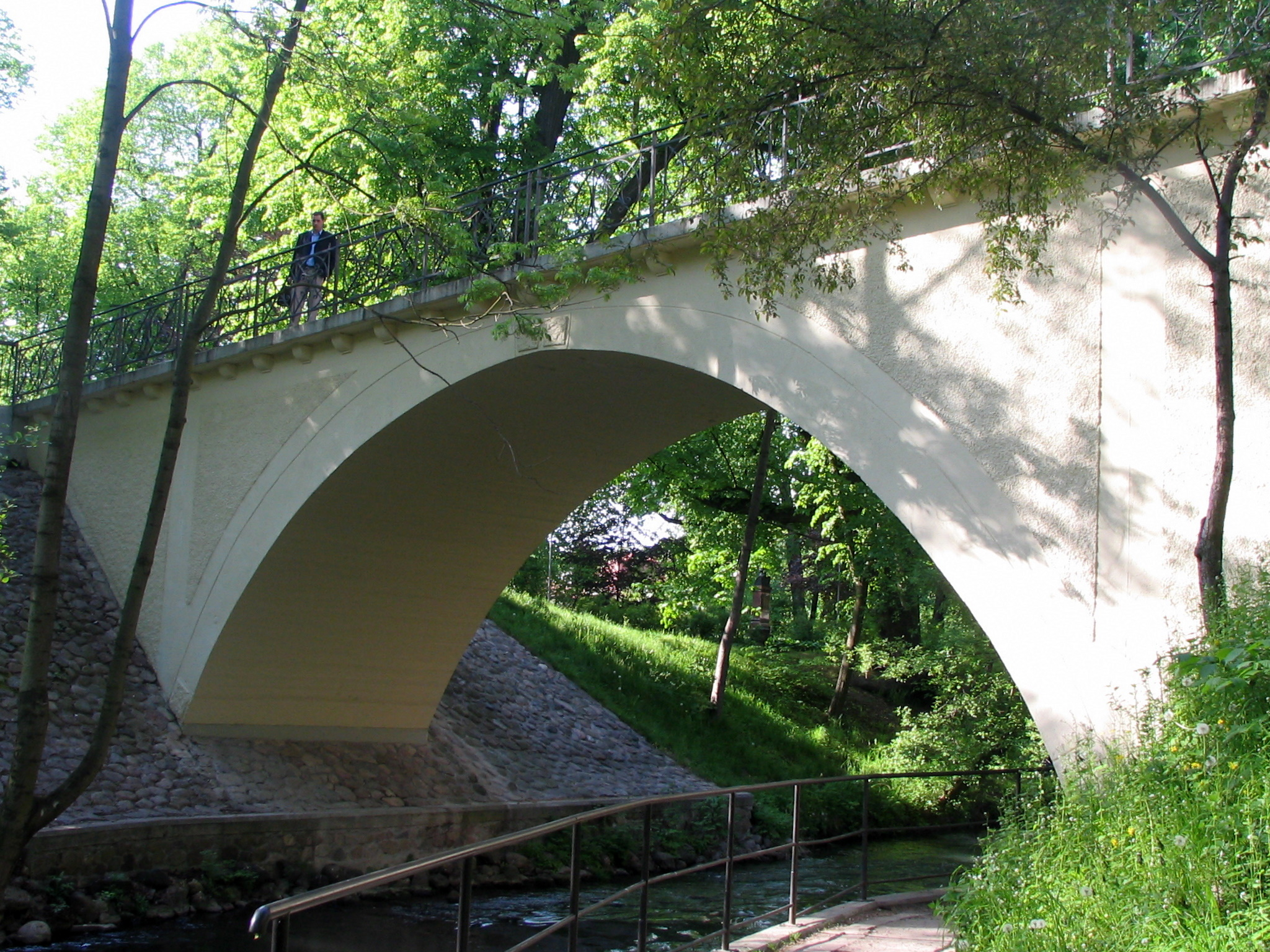 Most Zamkowy w Olsztynie